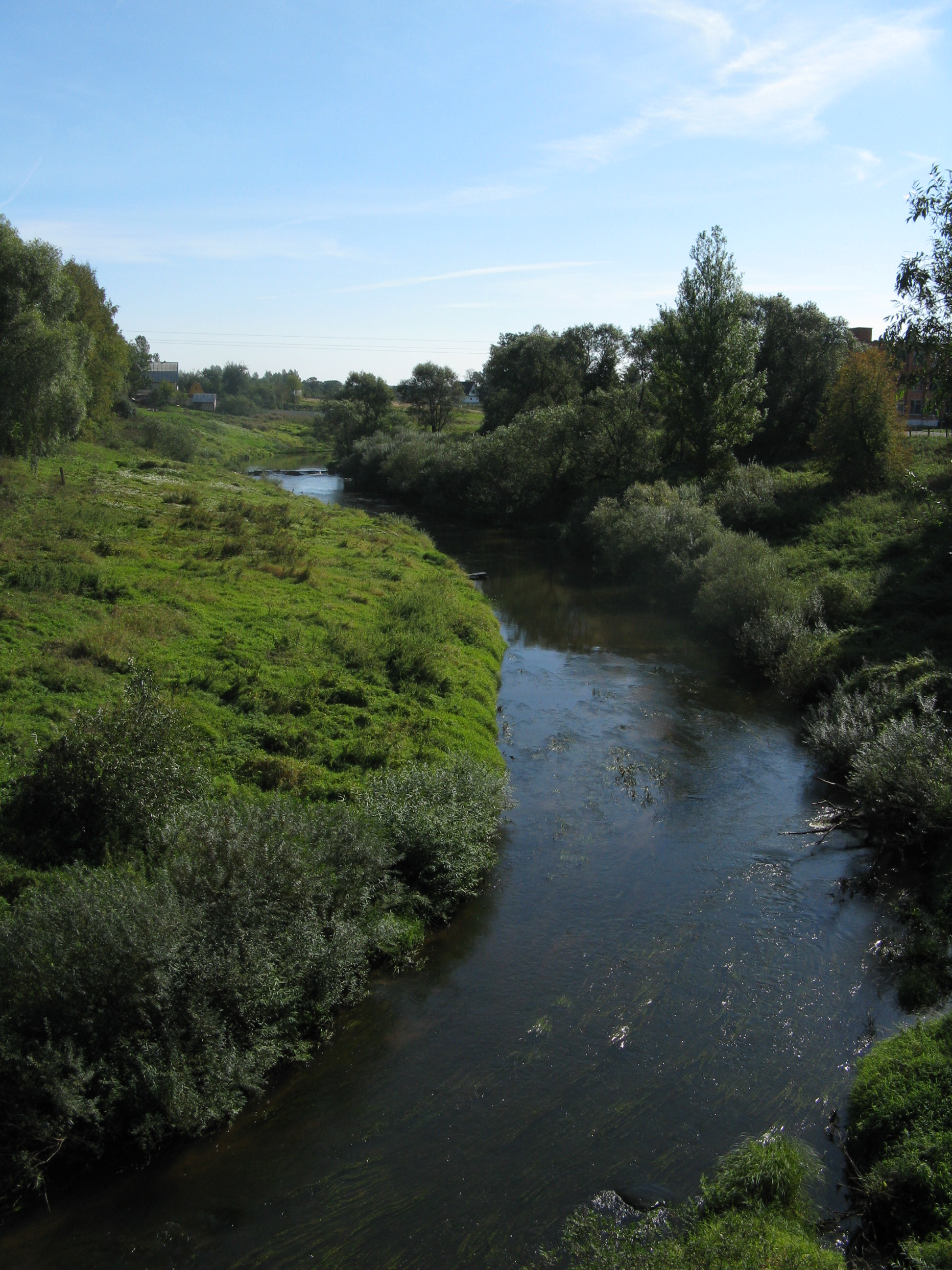 Река Гобза в г. Демидов